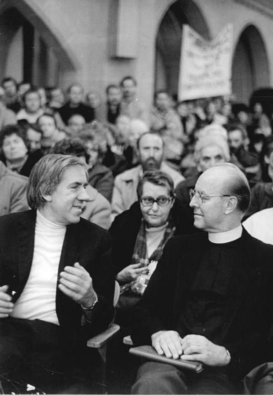 Gera, Johanniskirche, Friedensgebet ADN-ZB Kasper 23.11.89 Gera: Gebet In der Johanniskirche fanden sich etwa 2000 Menschen zum traditionellen Friedensgebet ein. An der Seite des Geraer Pfarrers Joachim Urbig (l) Landesbischof Dr. Werner Leich. Abgebildete Personen: Leich, Werner Dr.: Vorsitzender der Konferenz der evangelischen Kirchenleitung, DDR (GND 119066785)